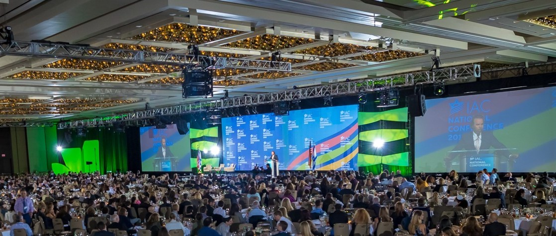 הכנס השנתי של ארגון הקהילה הישראלית-אמריקאית 2016